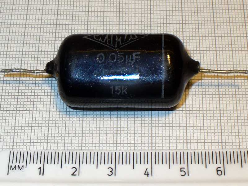 WIMA-Karamel-Bonbon, der typische WIMA Kondensator der 1950er Jahre